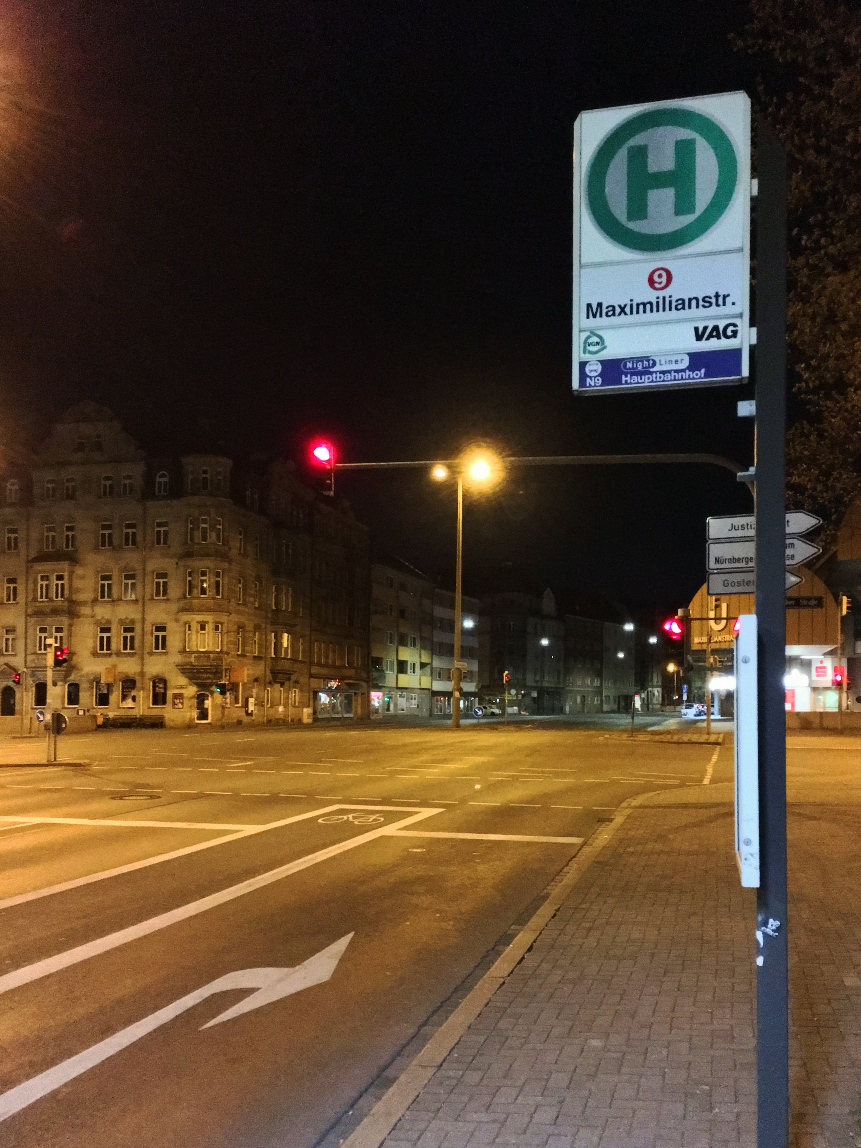 Nightlinerhaltestelle am U-Bahnhof Maximilianstraße in Nürnberg